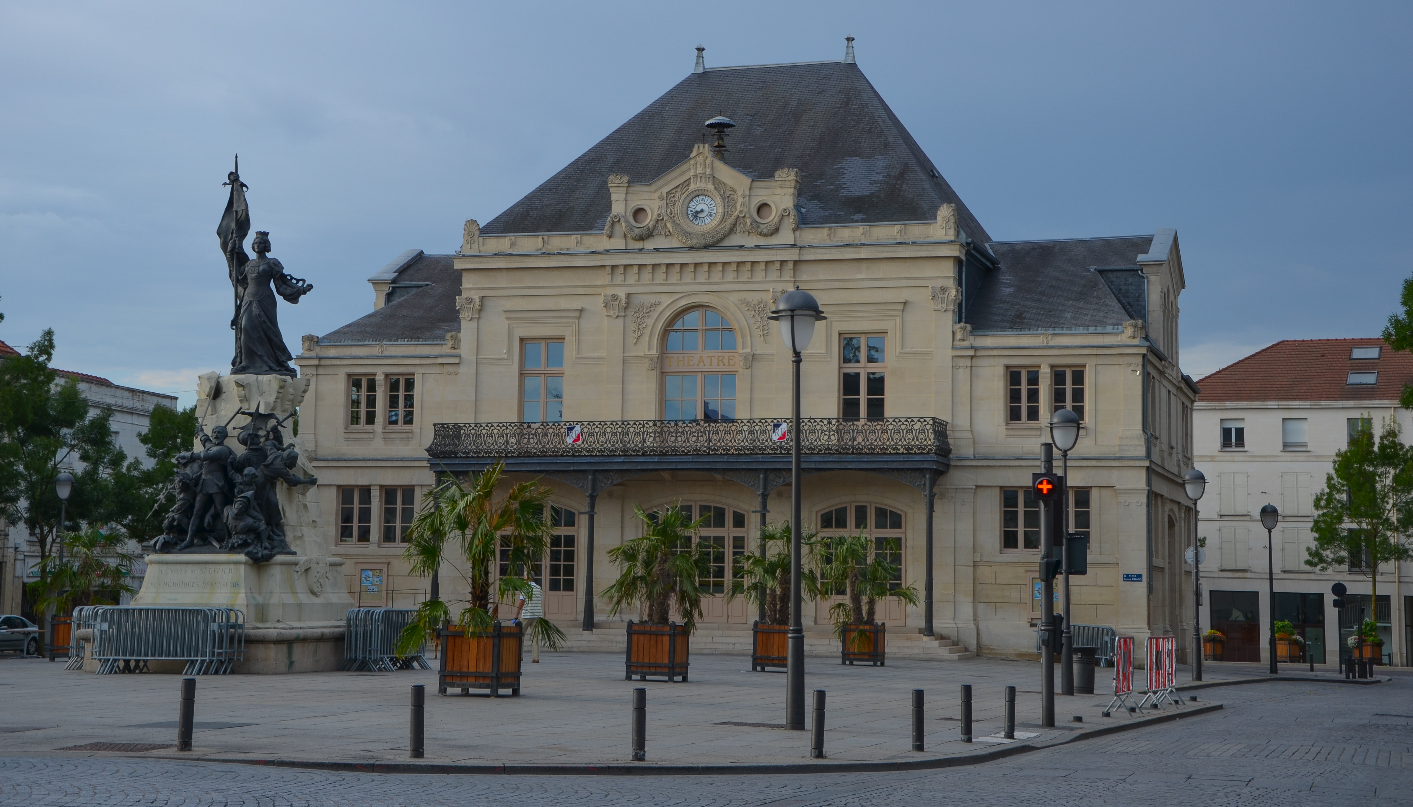 Theatre de St Dizier, Haute-Marne, France